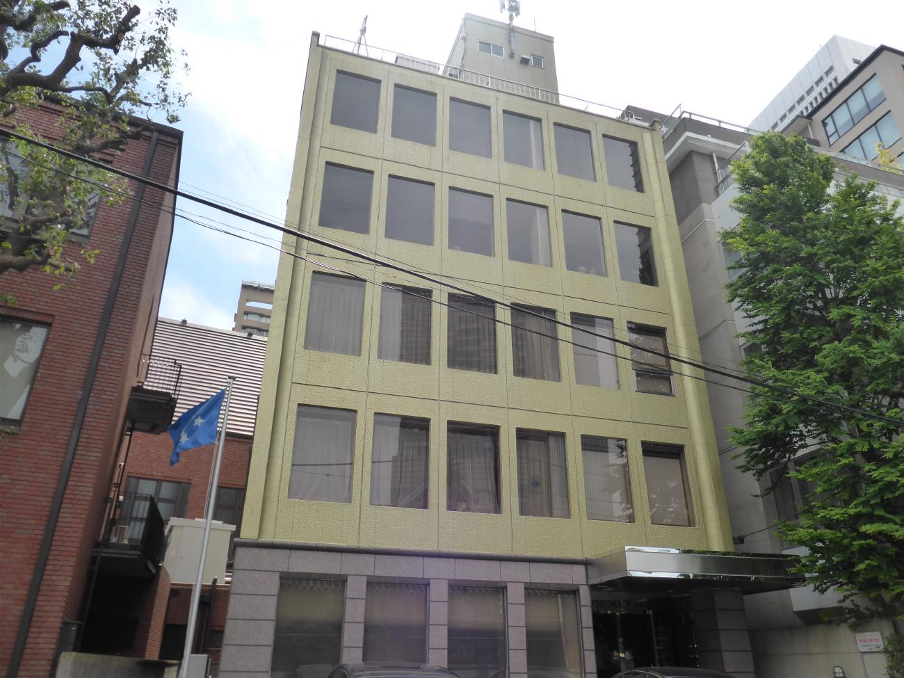 ミクロネシア大使館が入居するビル